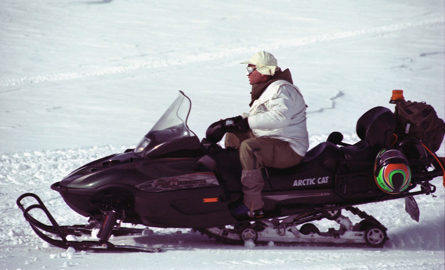 February 20, 2002. An Alpine Unit soldier rides his snowmobile on Mt. Hermon. The Alpine Unit carries out regional defense tactics, shooting while skiing at high speeds, snowmobiling, and riding Sno-Cats. The unit is comprised of volunteer reserve soldiers who served in elite units during their regular service and who take part in reserve days in Judea and Samaria and the northern border, particularly Mt. Hermon. חייל מיחידת האלפיניסטים רוכב על אופנוע השלג שלו בחרמון. יחידת האלפיניסטים מבצעת אימוני הגנה מרחבית, התקפה וירי תוך כדי תנועה מהירה בגלישה עם ציוד סקי מתקדם, אופנועי סקי וחתולי שלג מיוחדים. היחידה מורכבת מאנשי מילואים ששירתו בסדיר ביחידות המיוחדות של צה"ל, אשר עושים ימי מילואים בשטחי איו"ש ובגבול הצפון, במיוחד בחרמון.